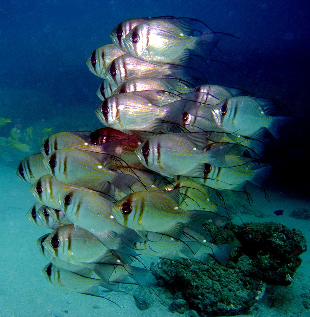 Glaucosoma magnificum